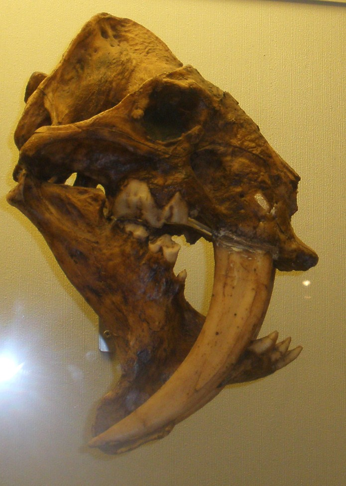 Fossil of Barbourofelis, an extinct mammal - Took the picture at Museo di Paleontologia di Firenze